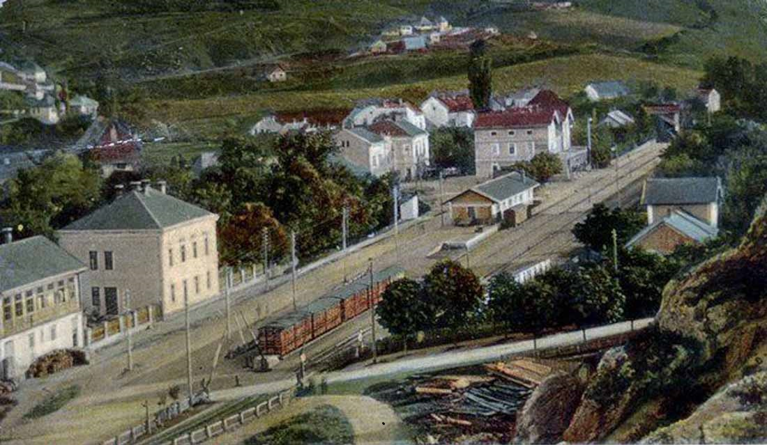 Bahnhof Travnik